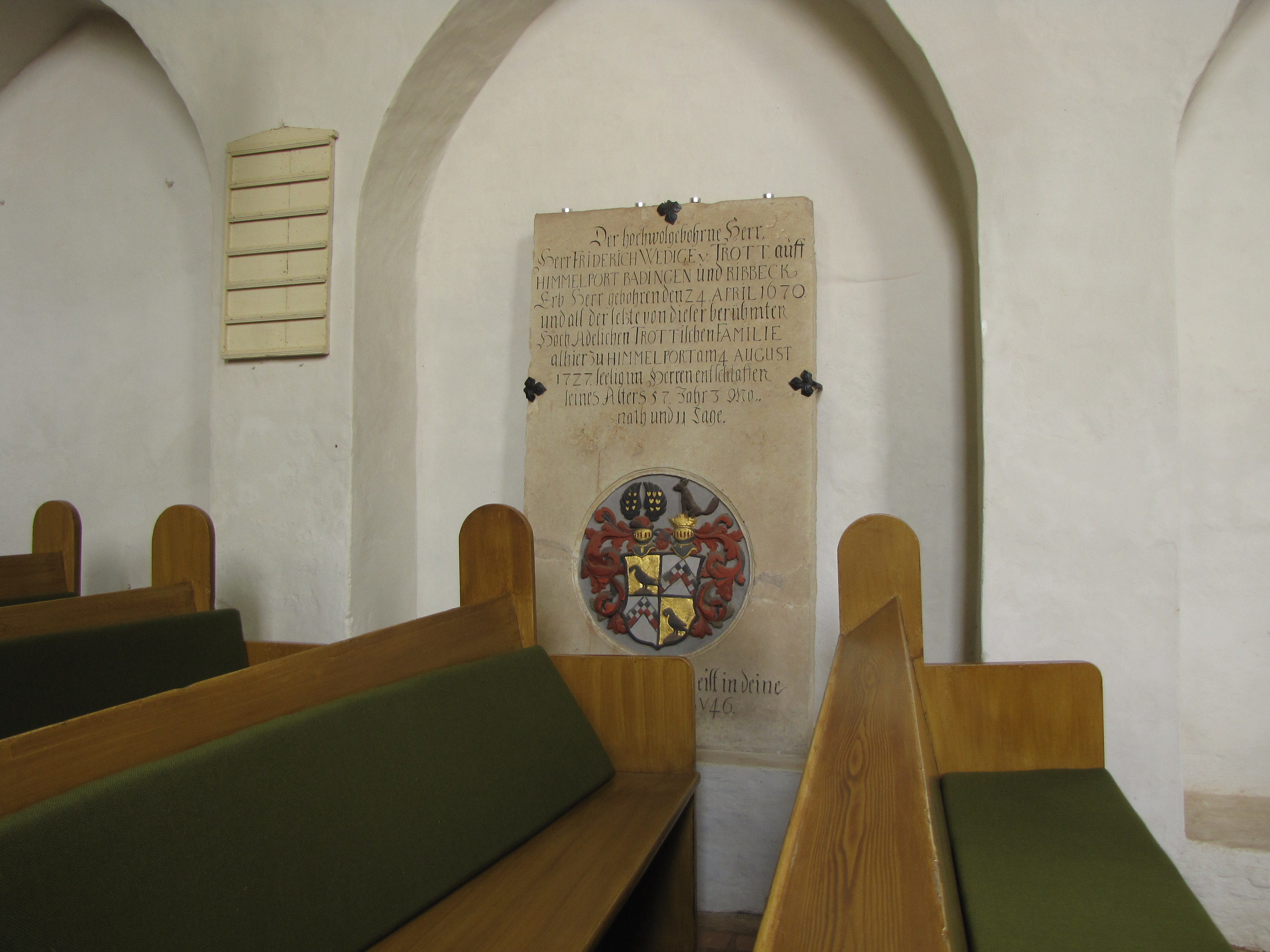 Grabstein des Friedrich Wedige v. Trott († 4. August 1727) in der Klosterkirche Himmelpfort, Ortsteil Himmelpfort, Stadt Fürstenberg/Havel, Lkr. Oberhavel, Brandenburg